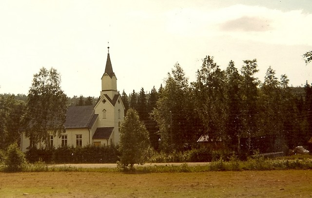 Trones kirke